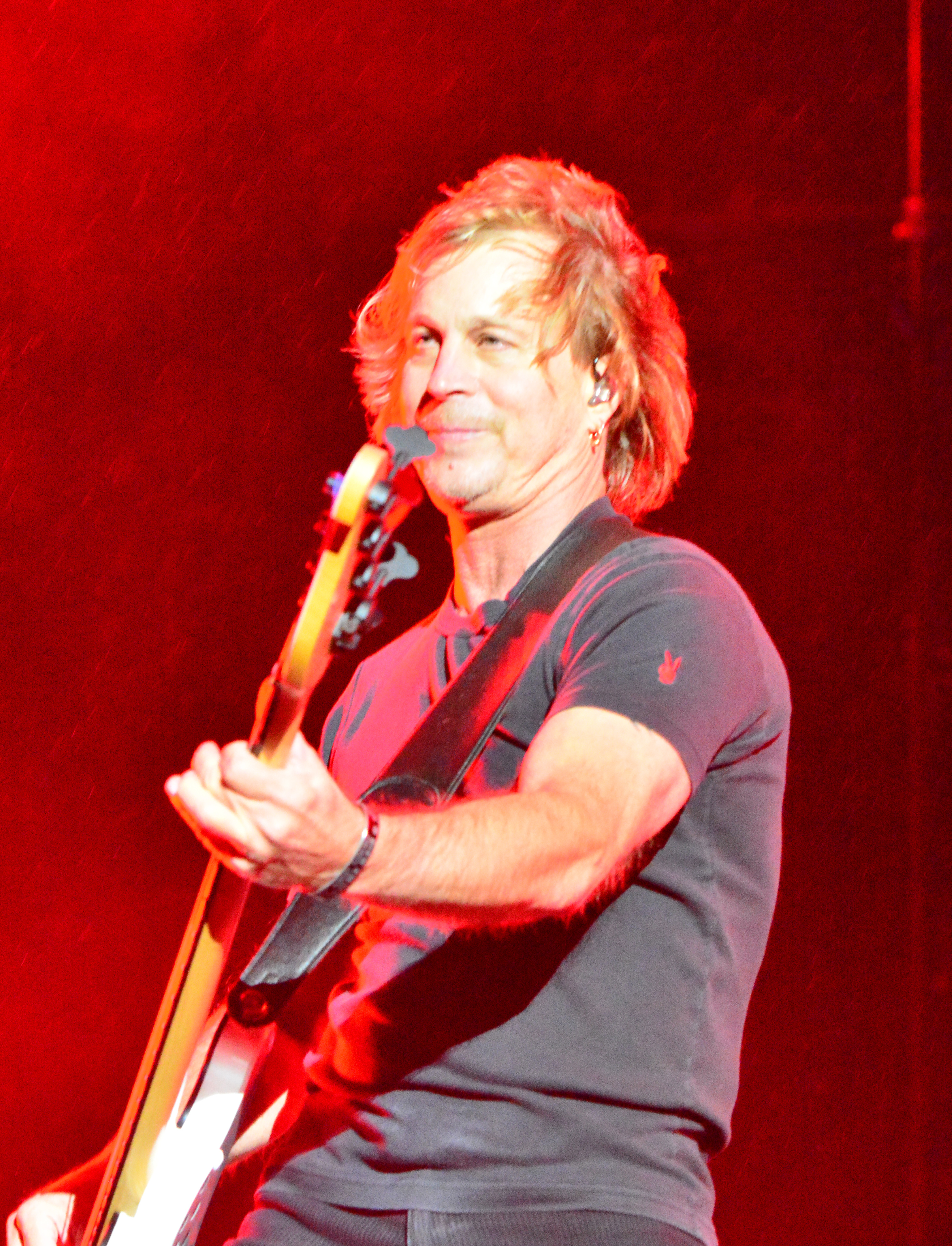 Savatage beim Wacken Open Air 2015